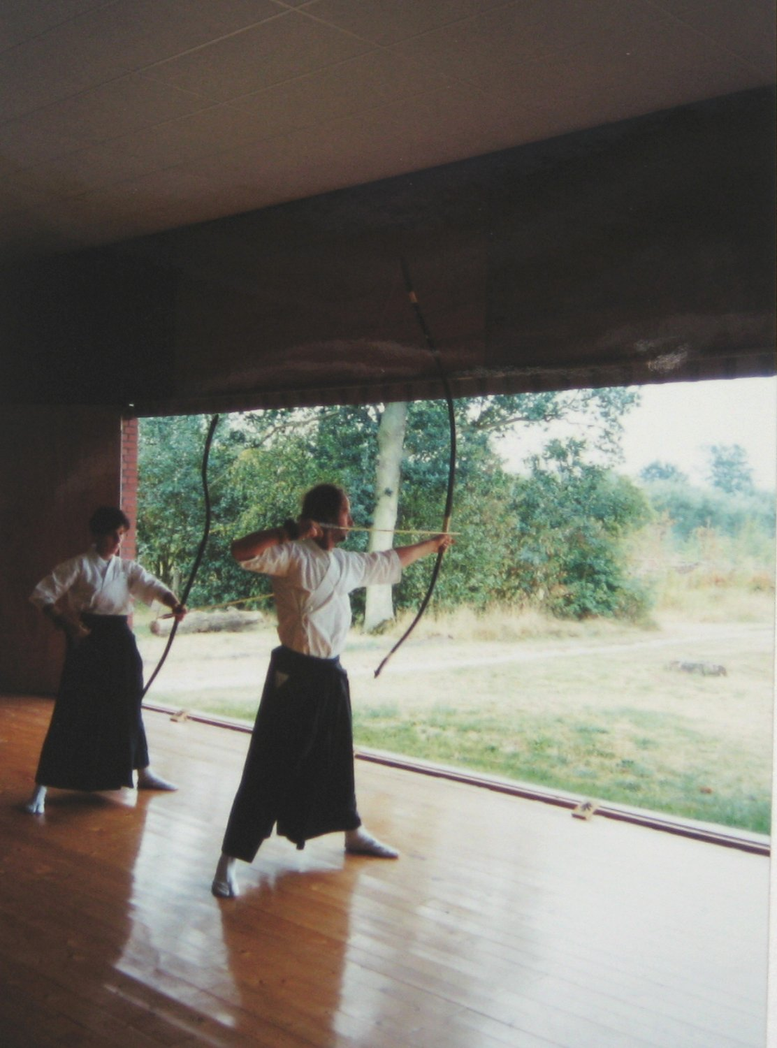 Kyudo